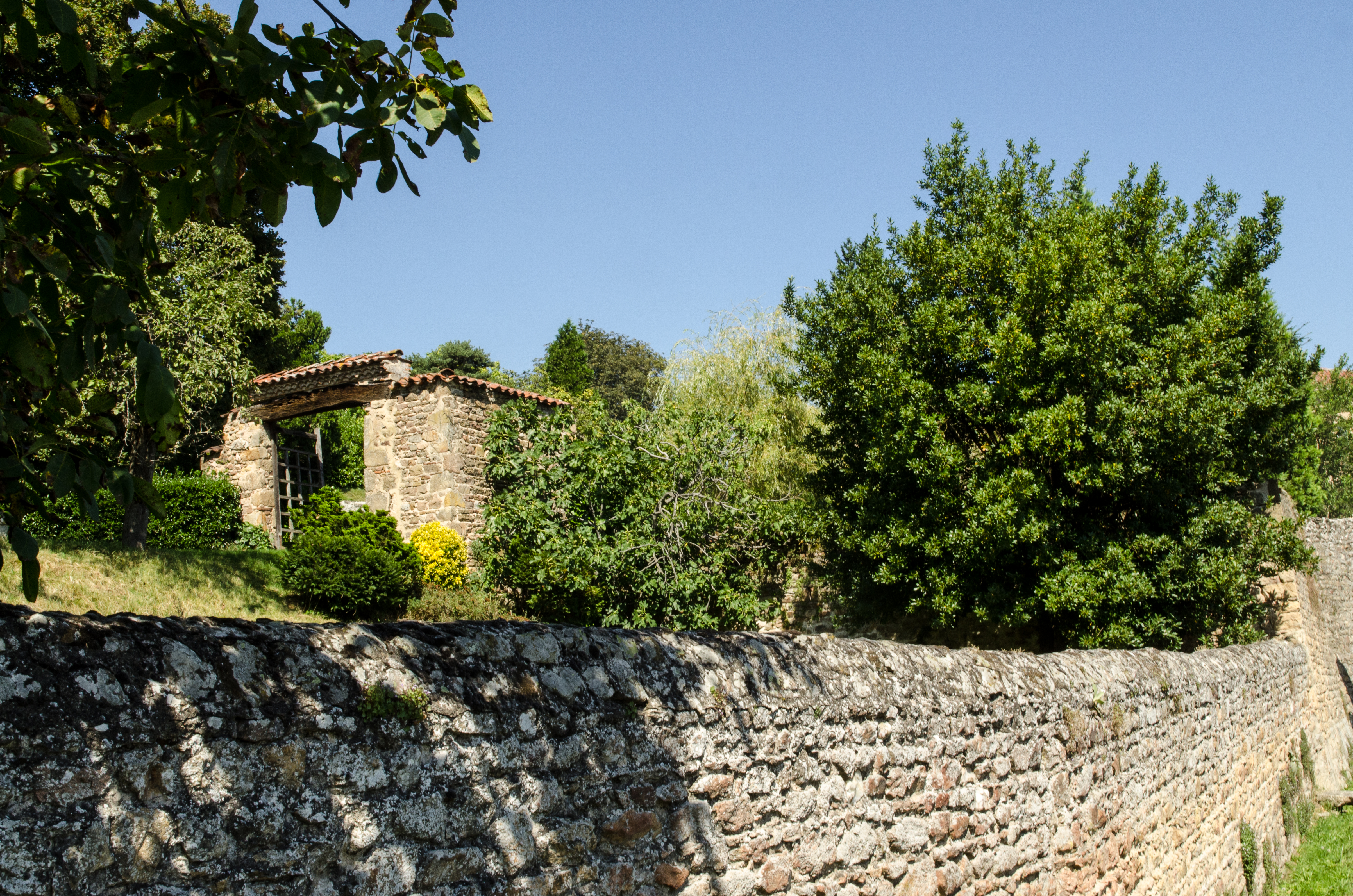 Château de Pollionnay, Pollionay, Rhône .